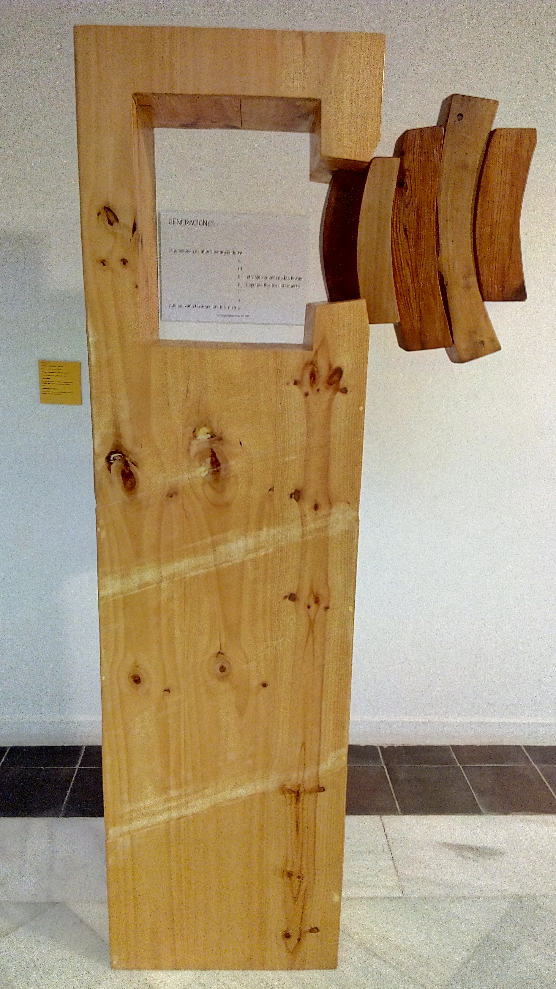 Exposición "Pulso Almado" en sala Casa de Vacas del Parque del Retiro de Madrid.